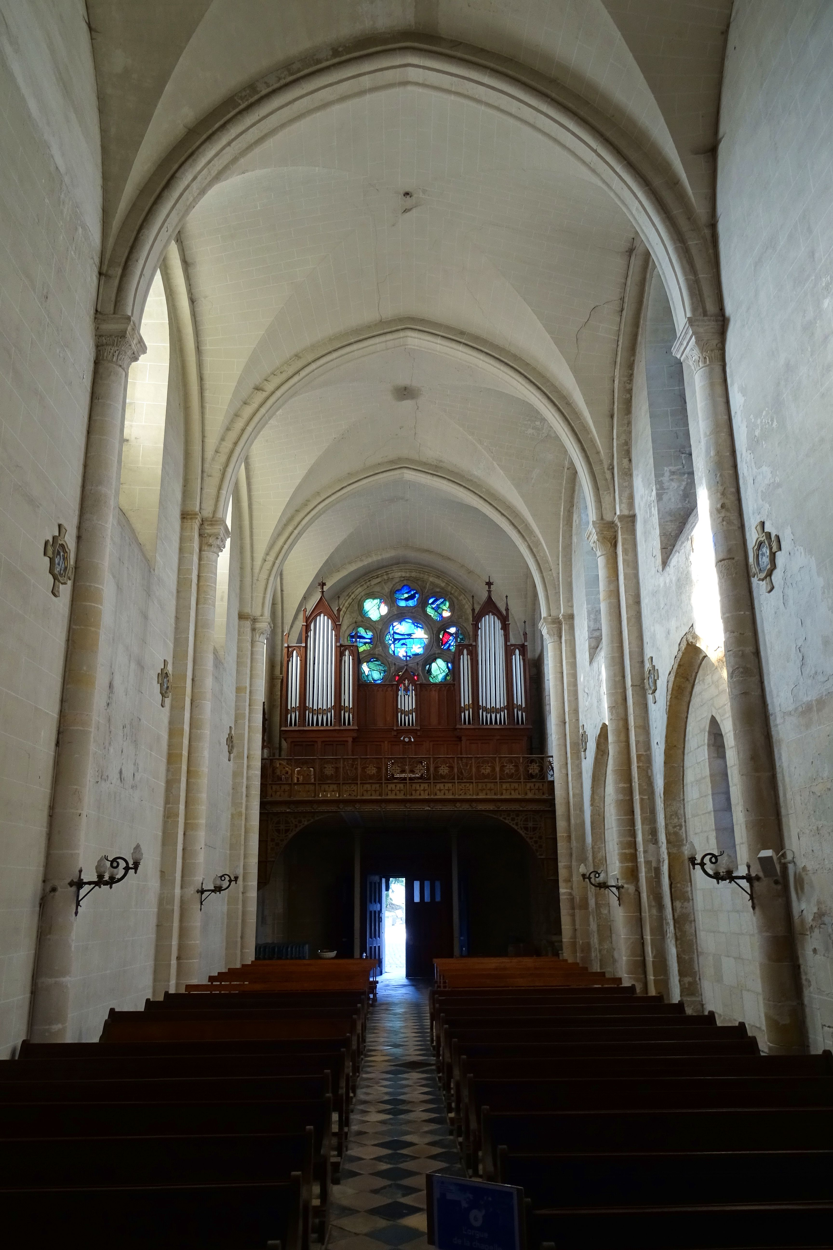 Voir titre.